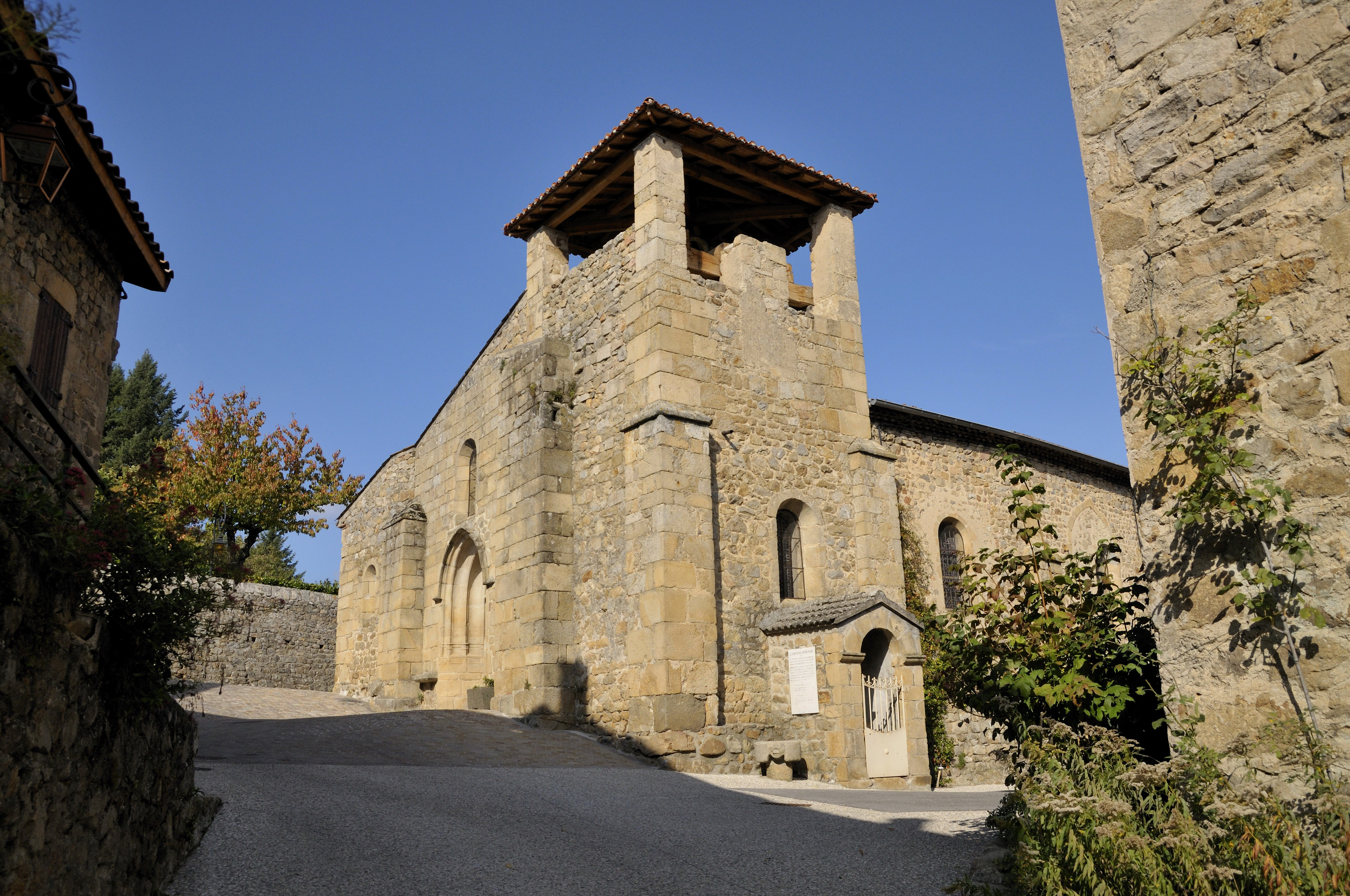 église de boucieu le roi ardêche france